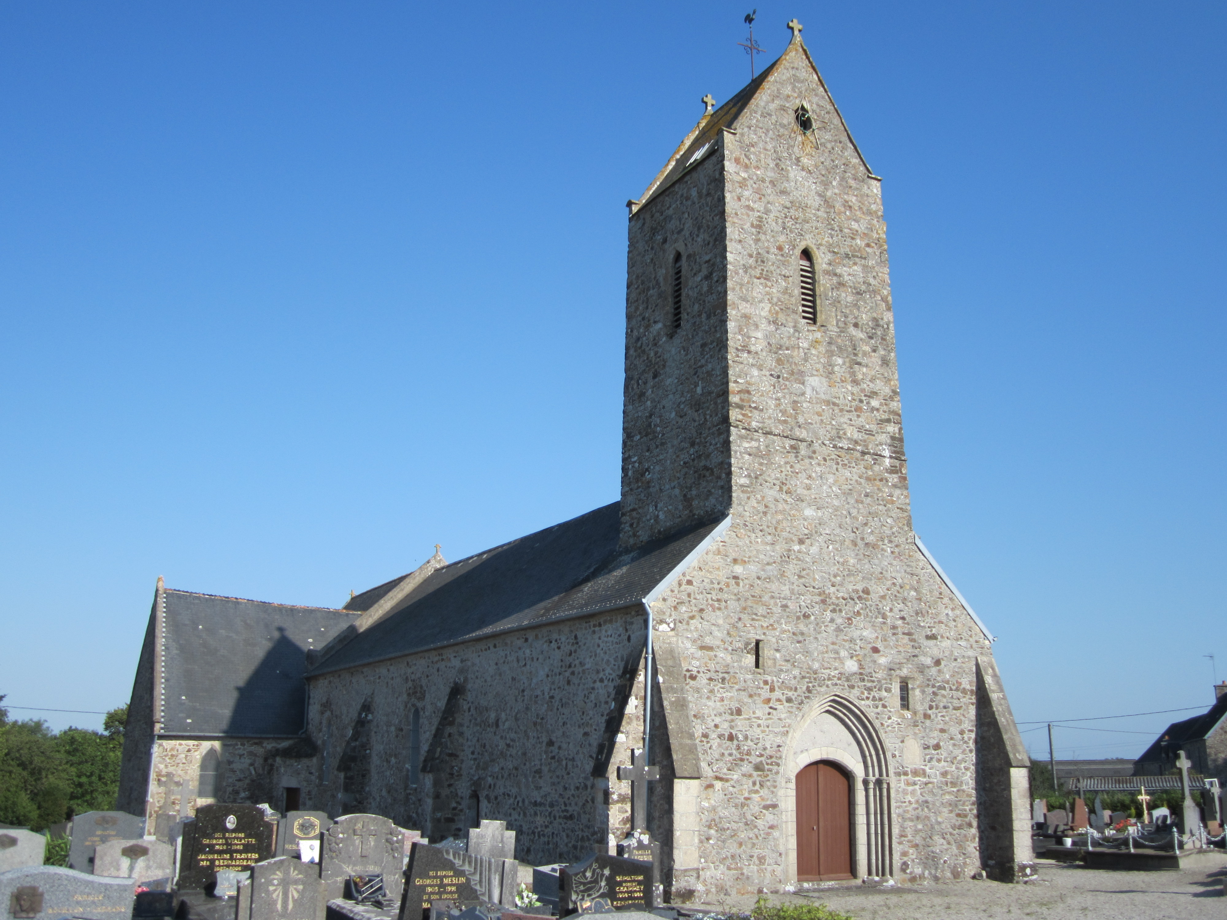 Fierville-les-Mines, Manche